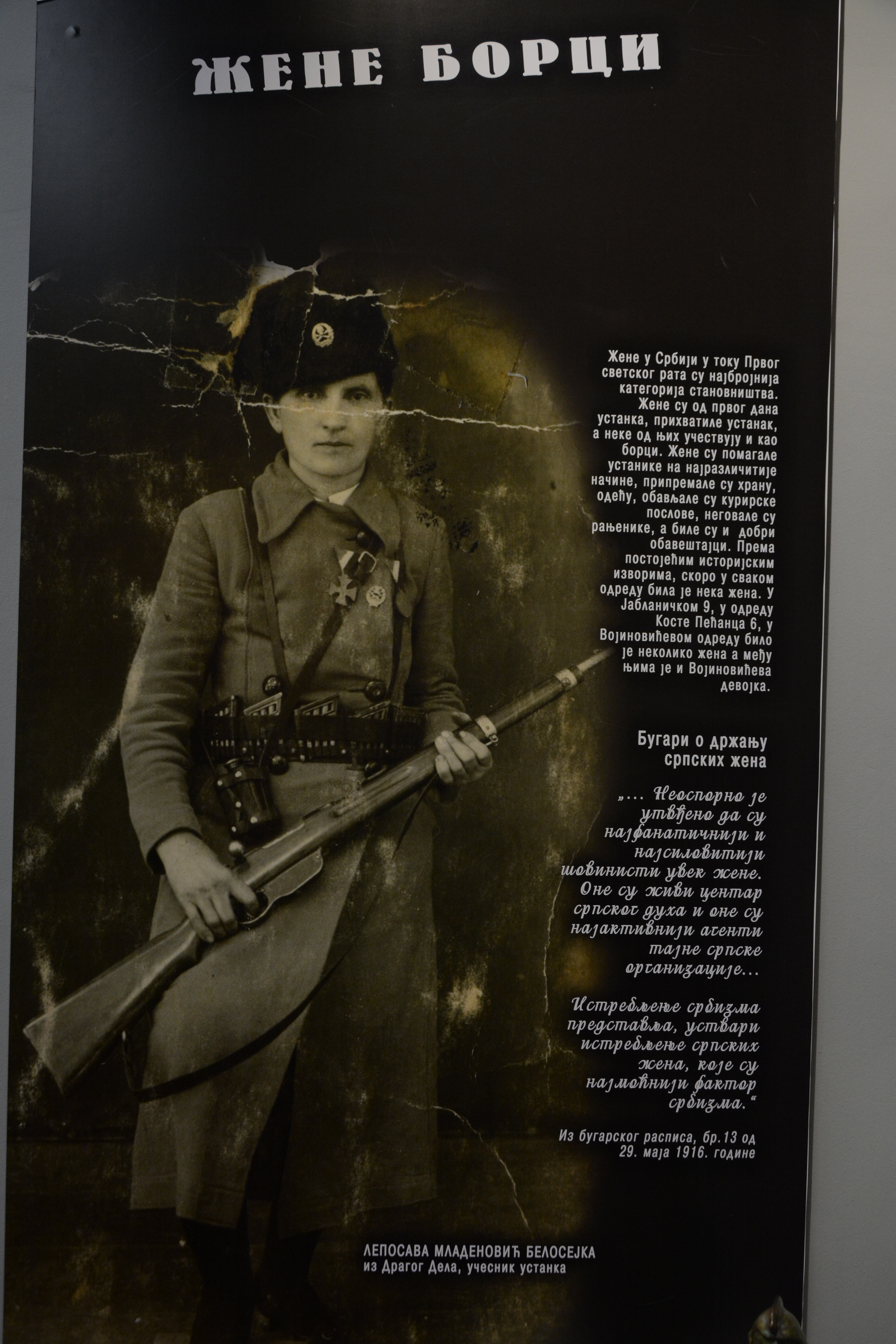 Ова датотека је донација Народног музеја Топлице, у оквиру програма стажирања реализованог од стране Викимедије Србије. This file is donated by the National museum of Toplice, as part of the Wikipedian in Residence program implemented by Wikimedia Serbia.